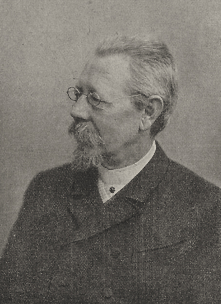 Maler Alfred Metzener, Bild Nachruf in Rhein und Düssel (No.44) vom 29. Oktober 1905